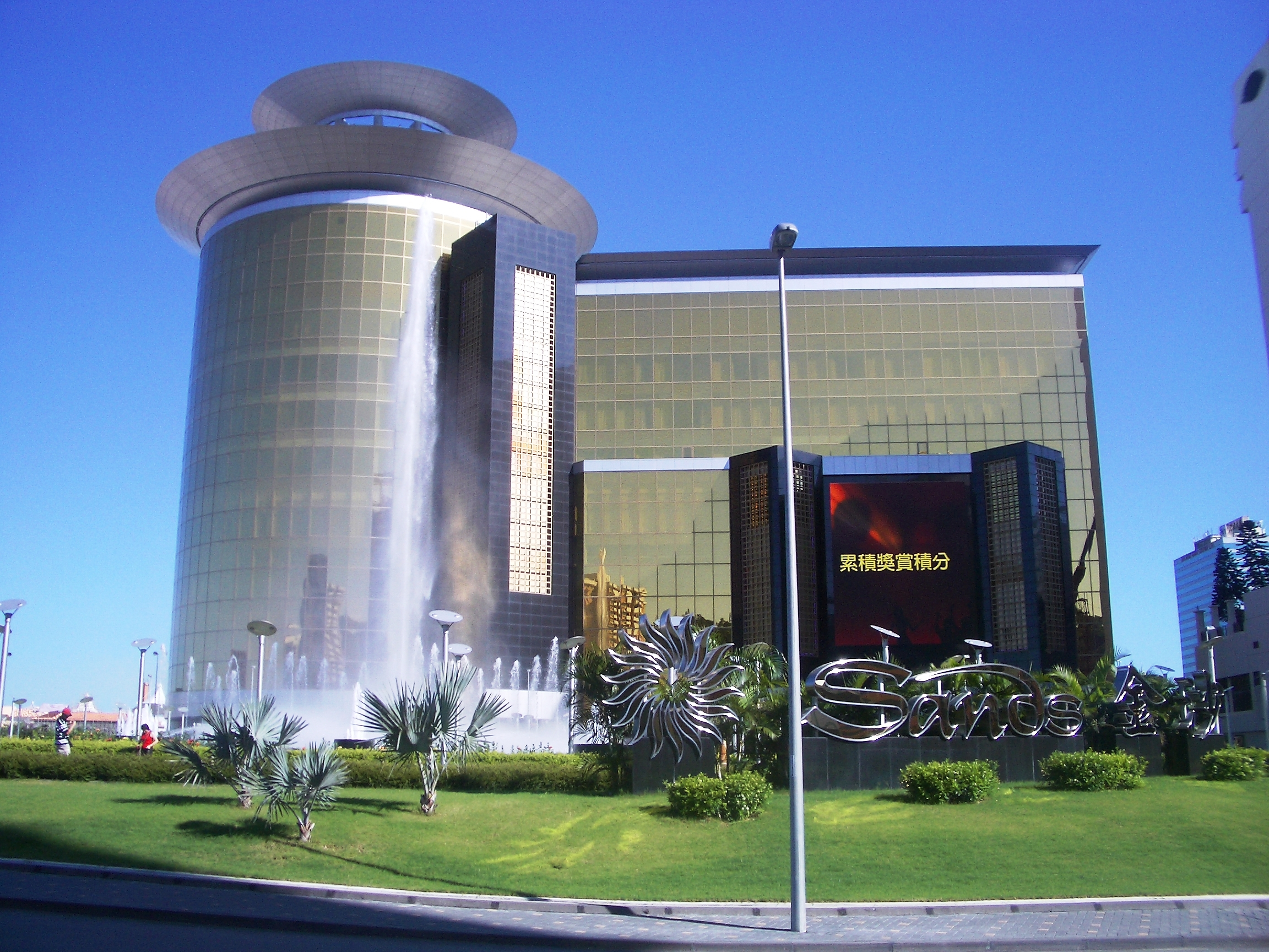 Sands Macau, taken by me